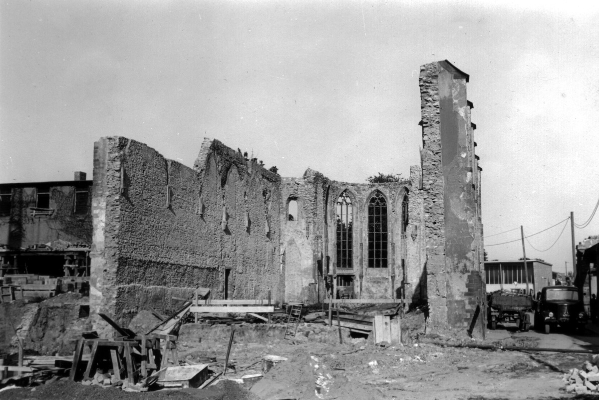 Ruine der Heiliggeistkirche, einem Teil des Dominikanerklosters in Frankfurt am Main. Man erkennt die Nordwand und die Trümmer des Chores. Im Hintergrund ist rechts die Blumengroßmarkthalle zu sehen.